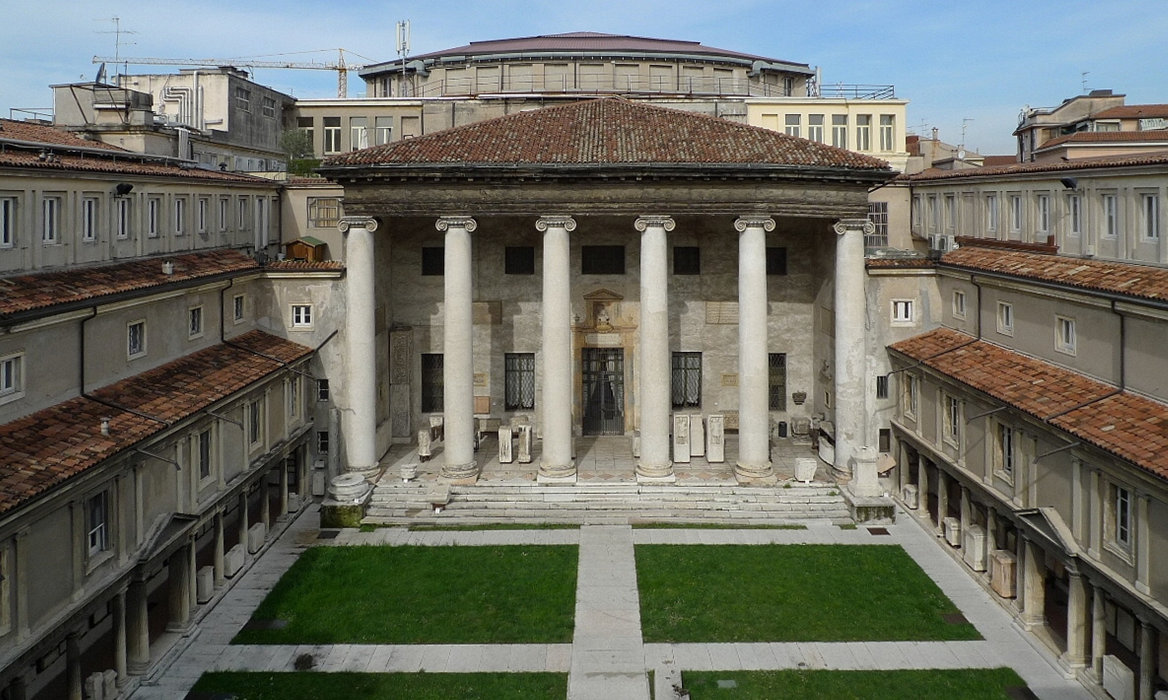 Museo Lapidario Maffeiano in Verona: Vorhalle zur Philharmonie mit sechs ionischen Säulen (ca. 1604 - 1624)